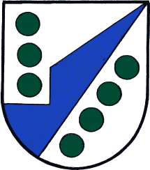 Die grünen Punkte im Wappen stehen für die einzelnen Ortschaften der Gemeinde, die durch ein blaues Symbol getrennt sind, das unseren Fluss kennzeichnet, die Kainach.